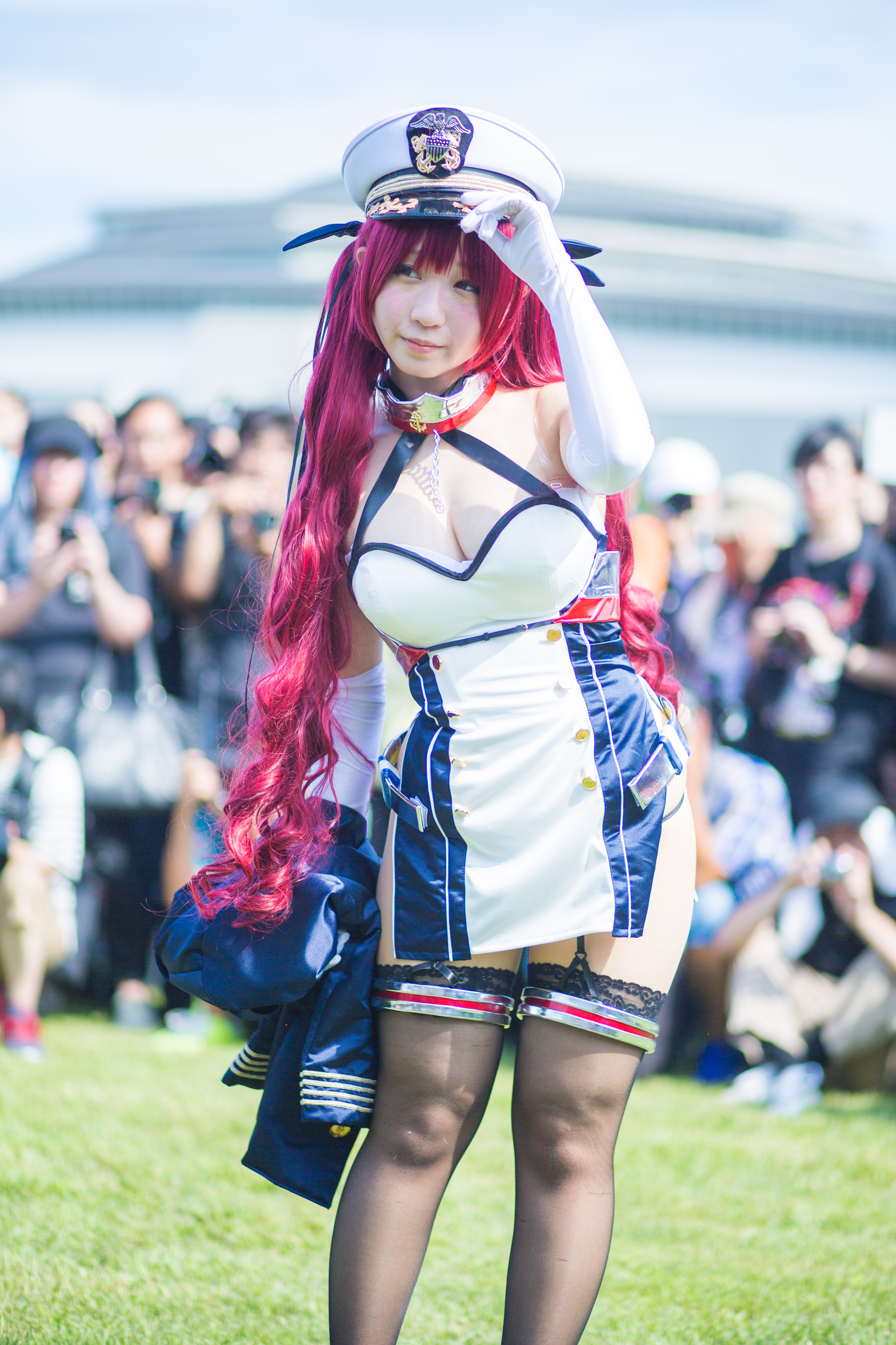 コミックマーケット94 1日目 コスプレイヤー